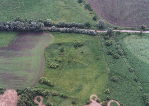 Hahót, Hungay, aerialphotography